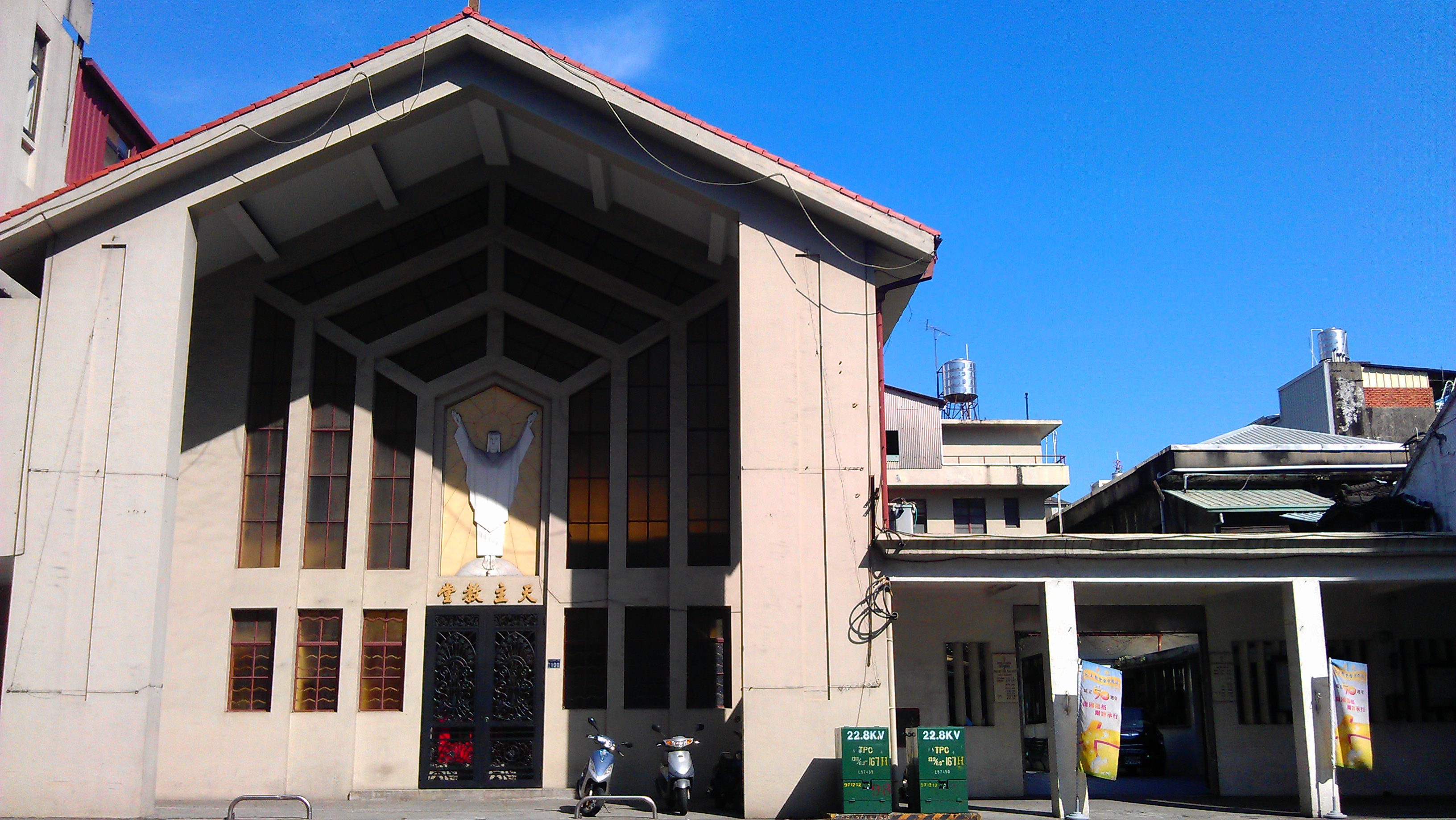 中文（台灣）: 台中市耶穌救主總堂